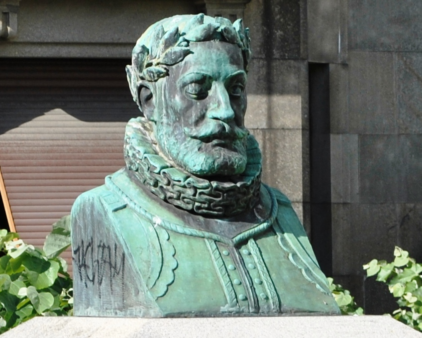 Véxase o título e as categorías.